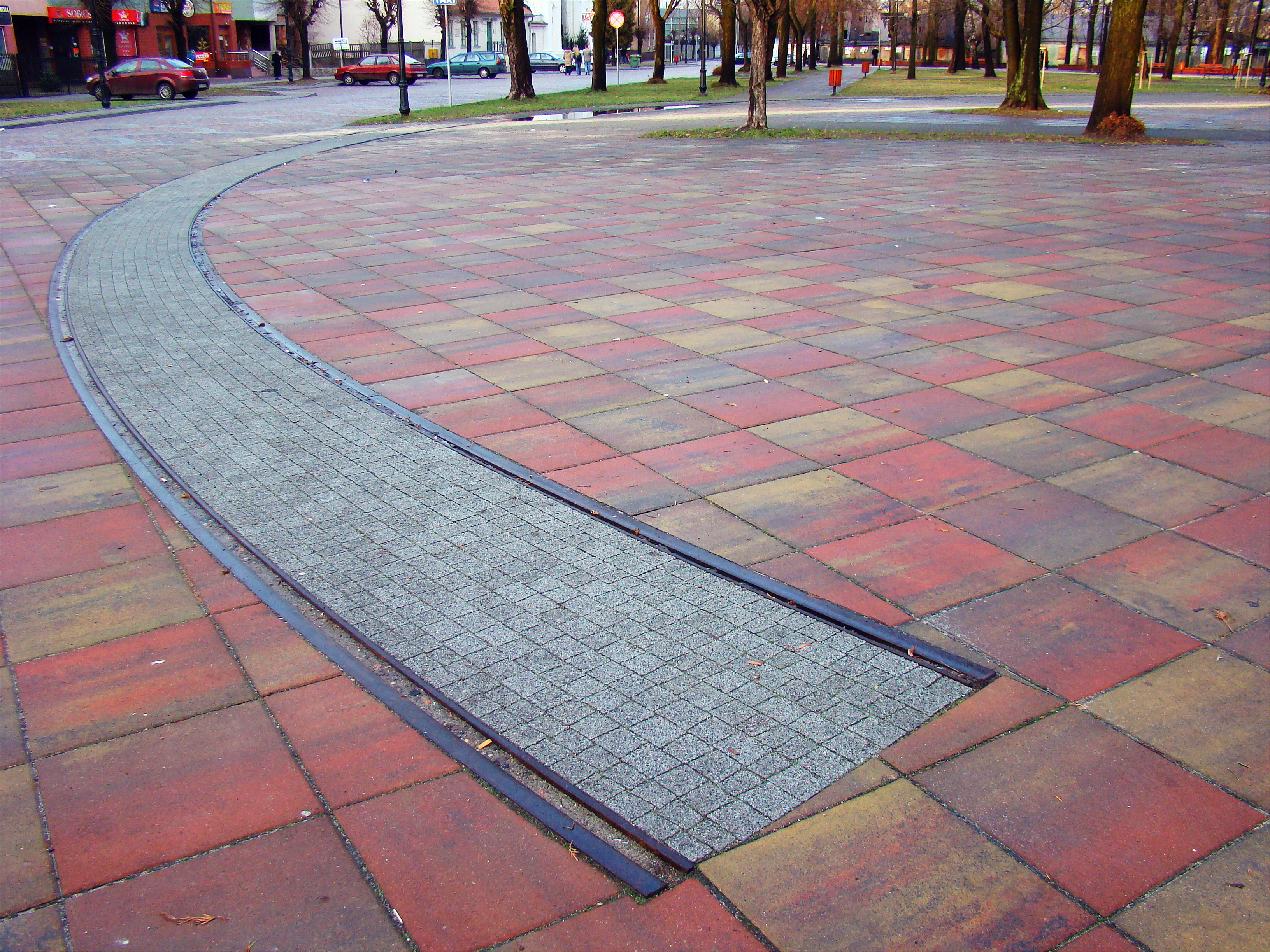 Pozostałości dawnego torowiska tramwajowego, Pl. T. Kościuszki w Aleksandrowie Łódzkim (powiat zgierski, województwo łódzkie), Polska